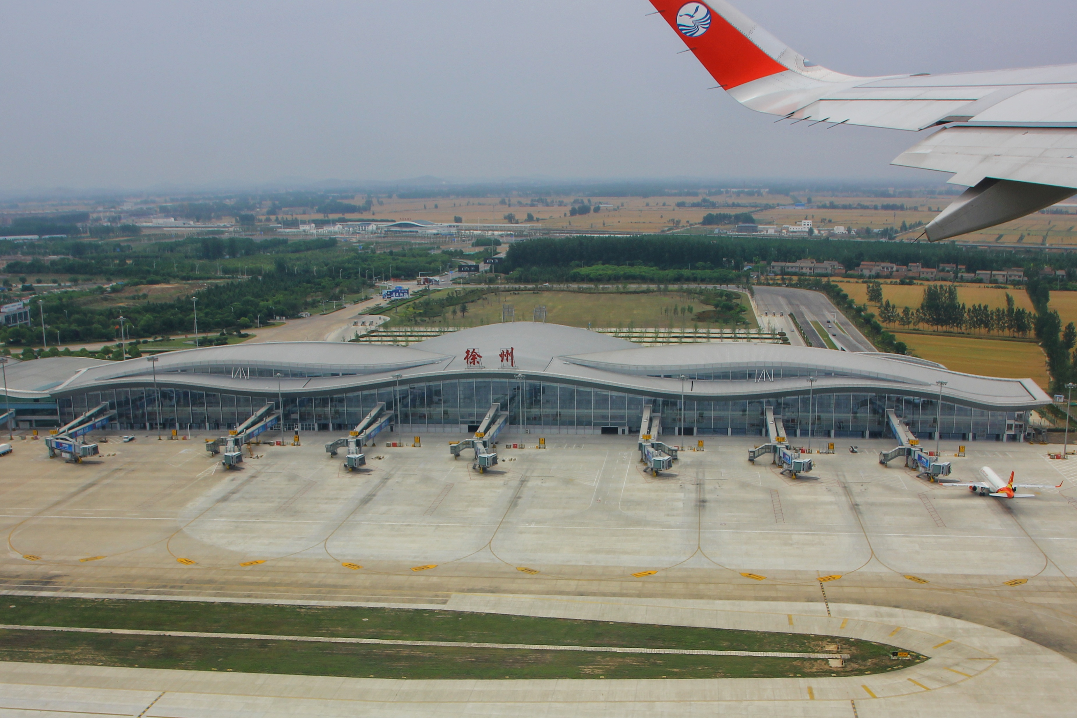 中文（中国大陆）: 空拍徐州观音机场